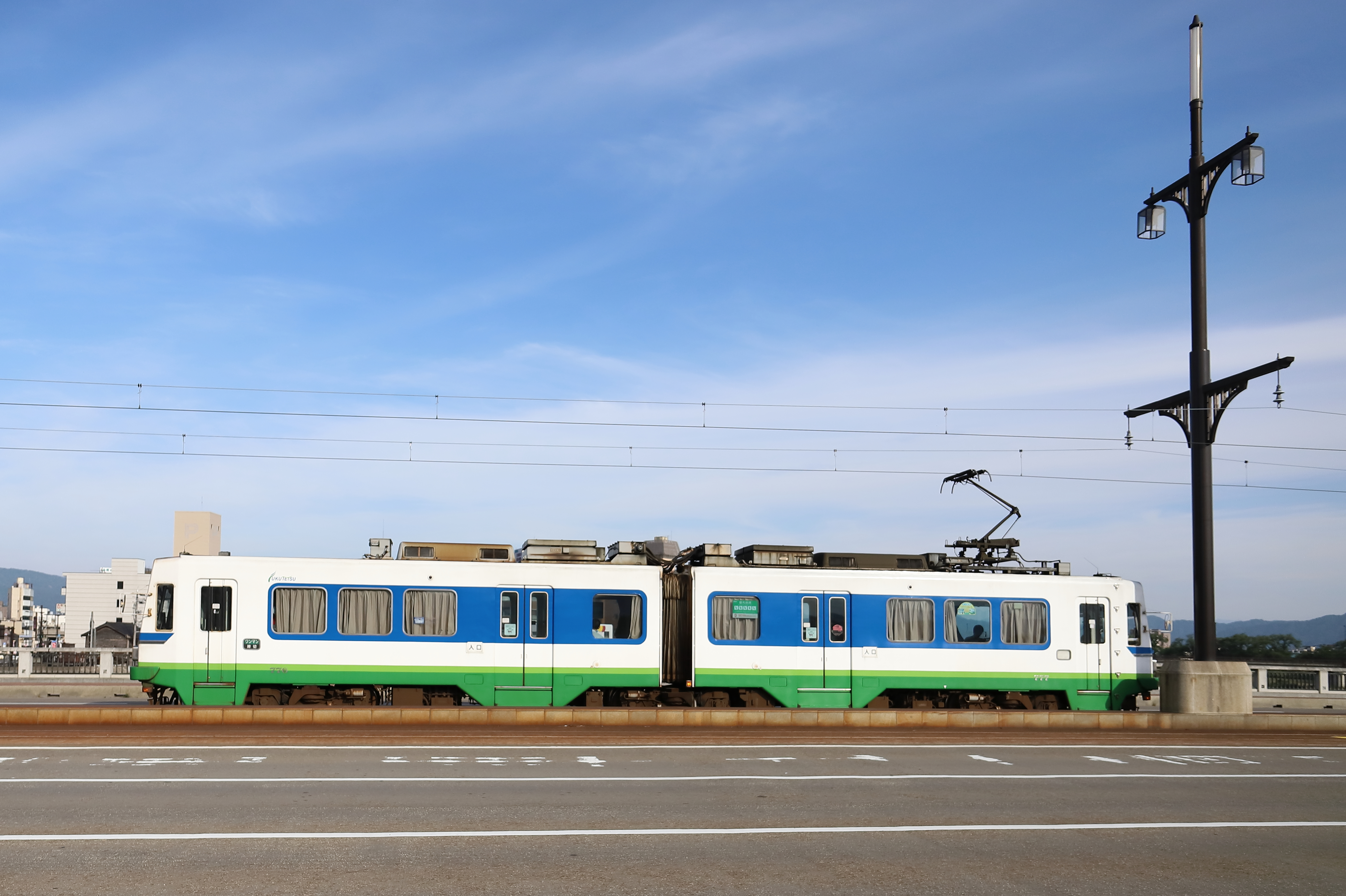 幸橋上を走る福井鉄道770型路面電車